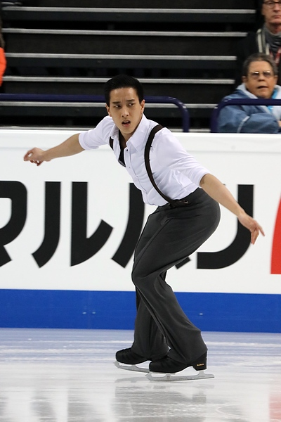 Джулиан Йи Чжи Цзе (Малайзия) на чемпионате мира 2017